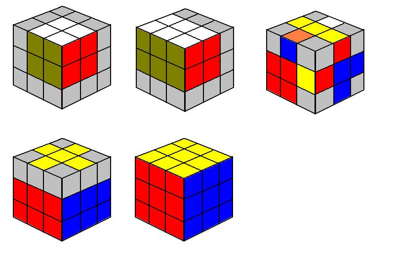 1. Blok 2x2x2 2. Blok 3x2x2 3. Orientacja 7 pozostałych krawędzi (L7E - last seven edges) 4. Dokończenie F2L-a 5. Rozwiązanie ostatniej warstwy.